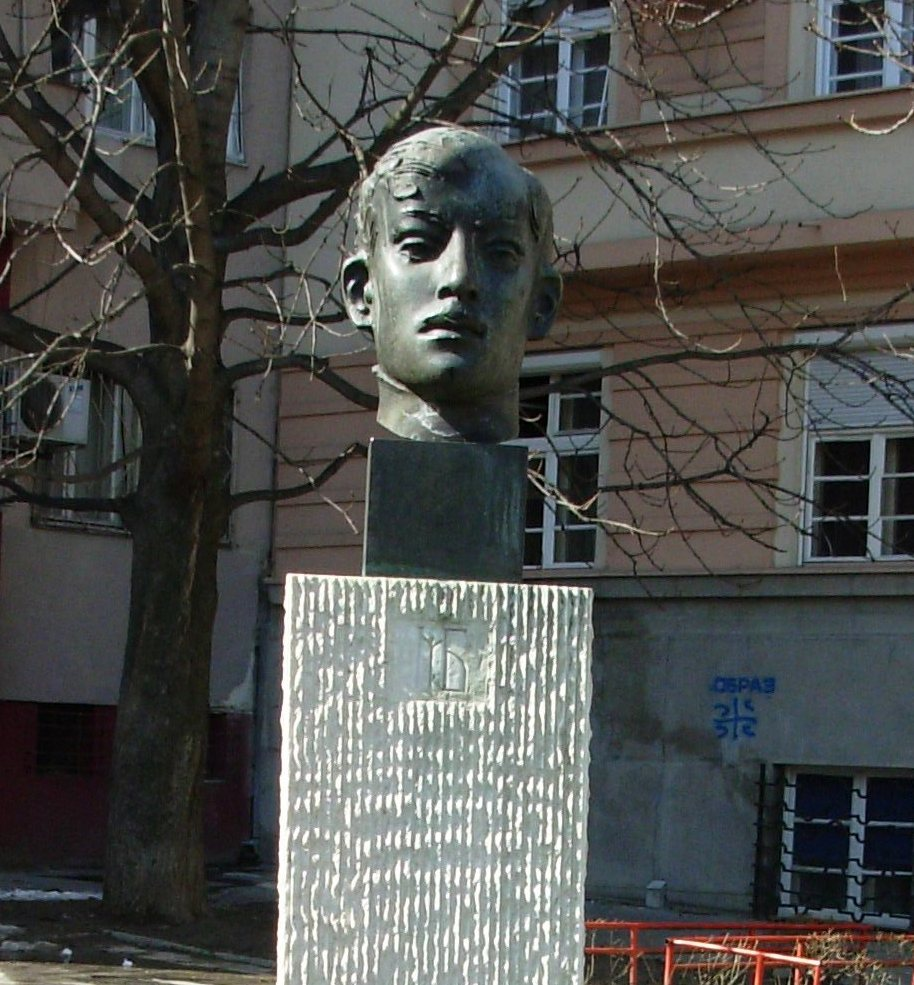 Биста Милутина Бојића, угао истоимене улице и Палмотићеве, Београд, сликао Голдфингер